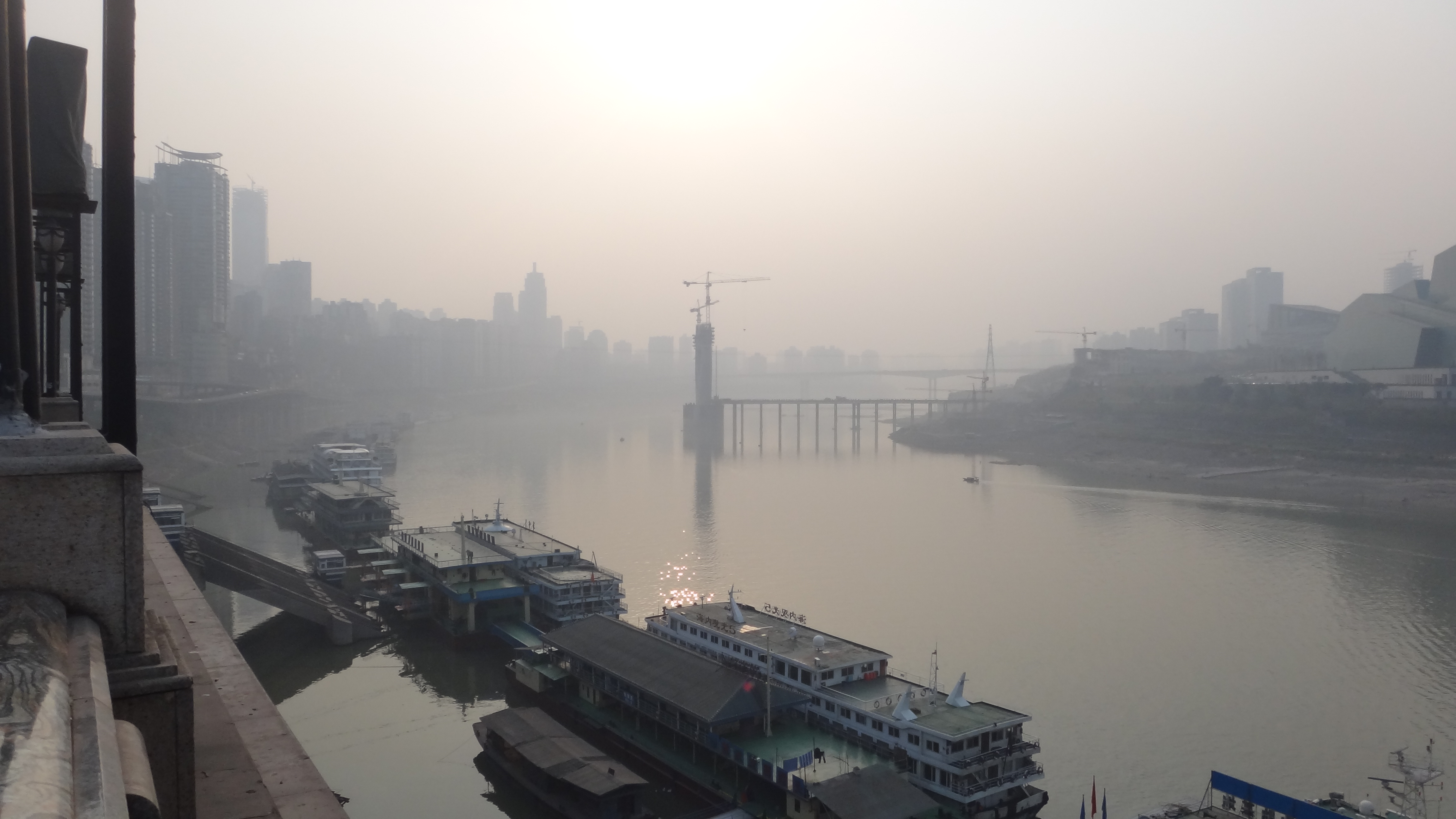 千厮门嘉陵江大桥的建设导致了原有的嘉陵江索道的暂停使用，然而却增加了沟通渝中半到与江北嘴的沟通桥梁